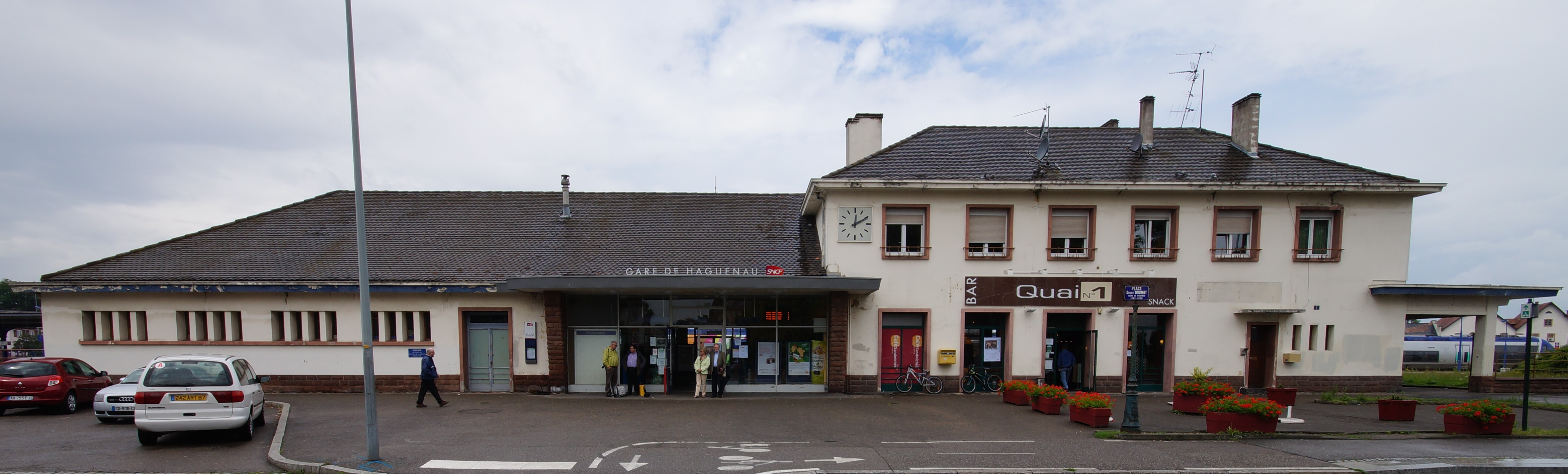 Das Bahnhofsgebäude des Haguenauer Bahnhofs in Frankreich